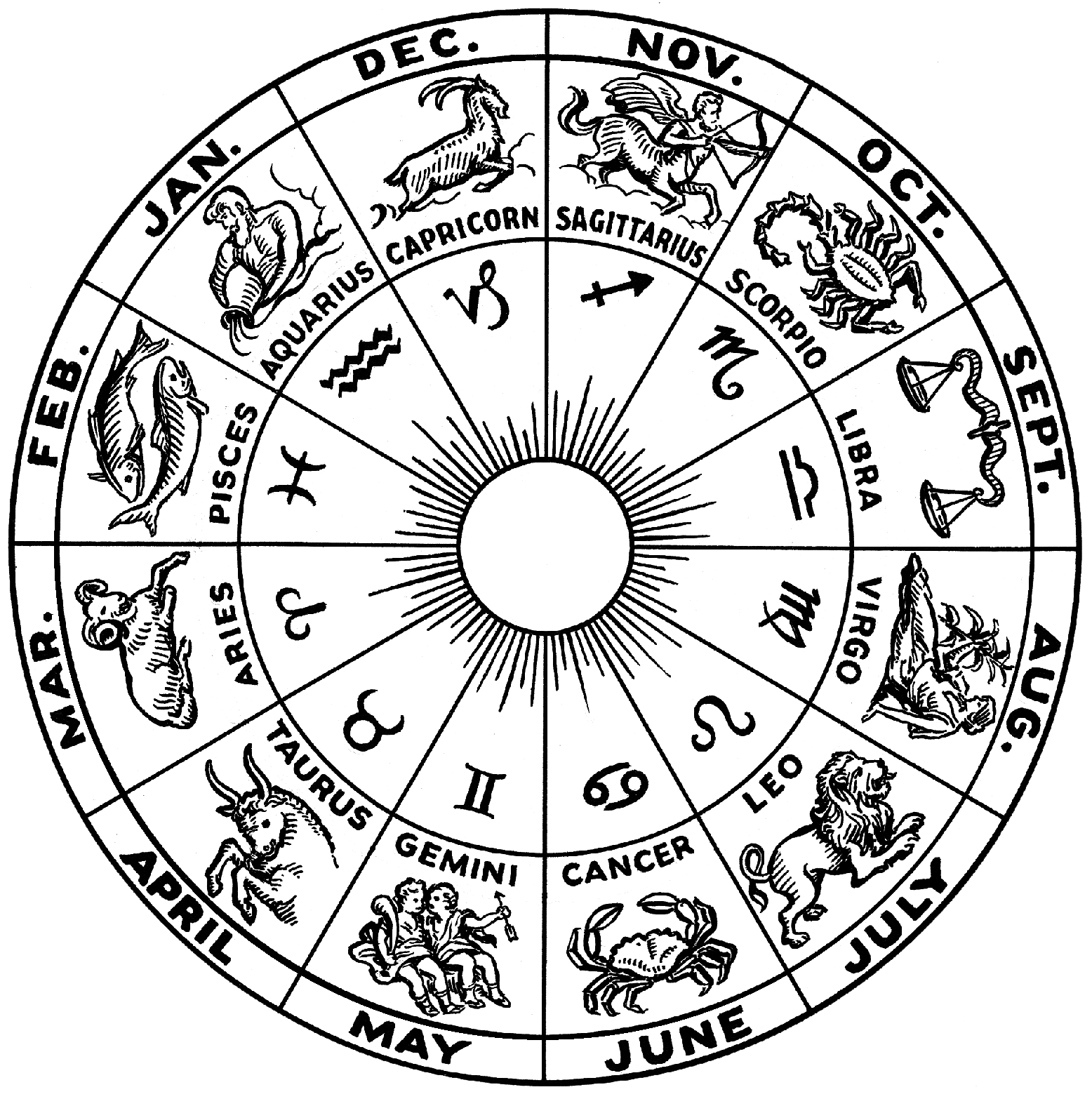 A modern zodiac wheel